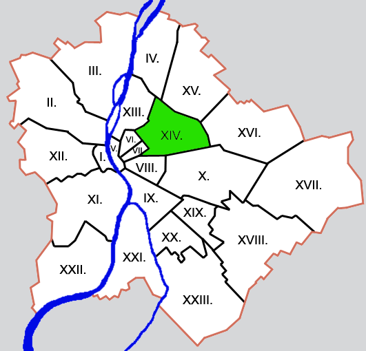 Budapest kerületei: XIV. kerület